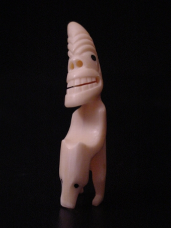 Tupilak